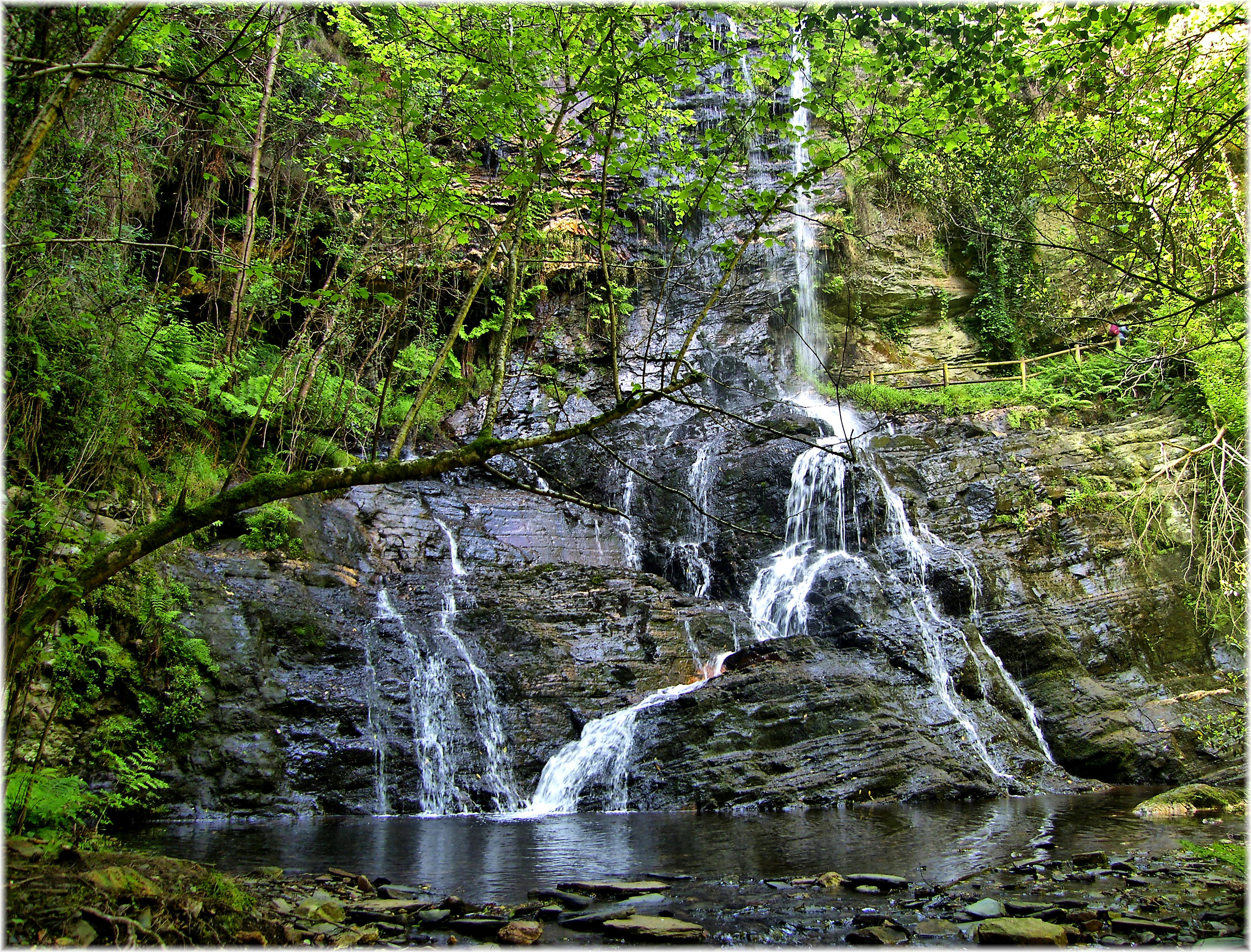 La cascada o fervenza de San Estevo do Ermo se encuentra en las cercanías de la ermita del mismo nombre, en el ayuntamiento de S. Cosme de Barreiros (Lugo). Es una bonita cascada con un desnivel de unos 15 metros, de acceso fácil y pintoresco. Nombre: Cascada de San Estevo do Ermo Lugar: San Estevo do Ermo Provincia: Lugo Comarca: Comarca de La Mariña Oriental Municipio: Barreiros Coordenadas: 43.52279,-7.23628 El punto de partida es la Casa do Concello en S. Cosme, al lado de la carretera N-634. Desde aquí hay dos rutas alternativas que nos llevan hasta la Capilla de Santo Estevo do Ermo: •Dirección Lugo; pasada la gasolinera tomamos una carretera a la izquierda, pasamos el barrio de las Eiras; una pista sin asfaltar, entre una arboleda de pinos y eucaliptos, bordeando O Rego de Santo Estevo (donde podemos observar restos de molinos), nos lleva hasta la capilla. Recorrido: 3'3 kms. •Tomando la carretera de la Insua, a l'9 Kms. una pista sin asfaltar a la derecha, nos lleva a la capilla, cruzando entre pinos y eucaliptos. Recorrido 3'3 Kms. Siguiendo cualquiera de las dos rutas, una vez llegamos a la capilla, la cascada nos queda siguiendo río arriba, a 2 minutos escasos. De muy fácil aceso.